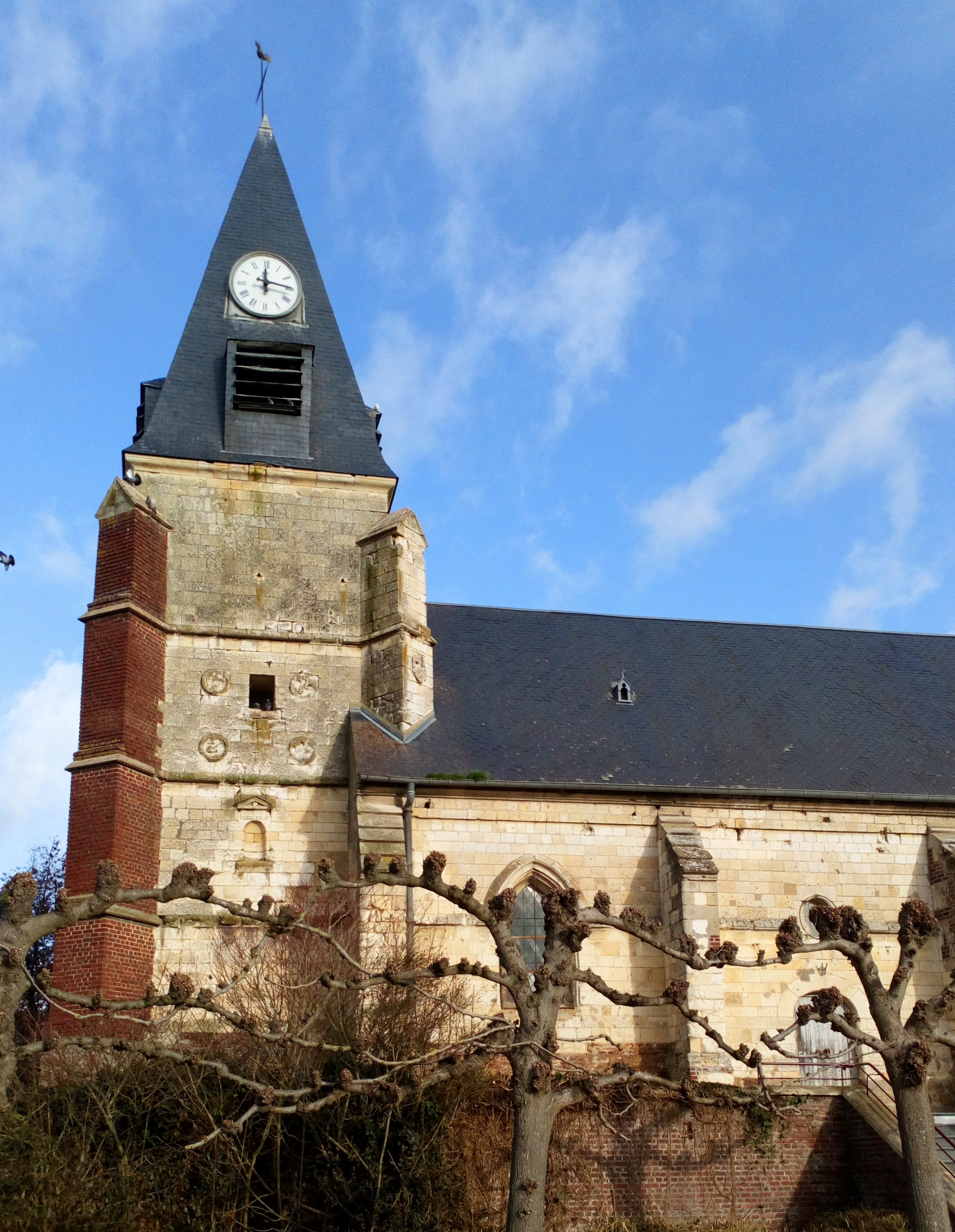 Église Saint-Vaast de Ribemont-sur-Ancre 1